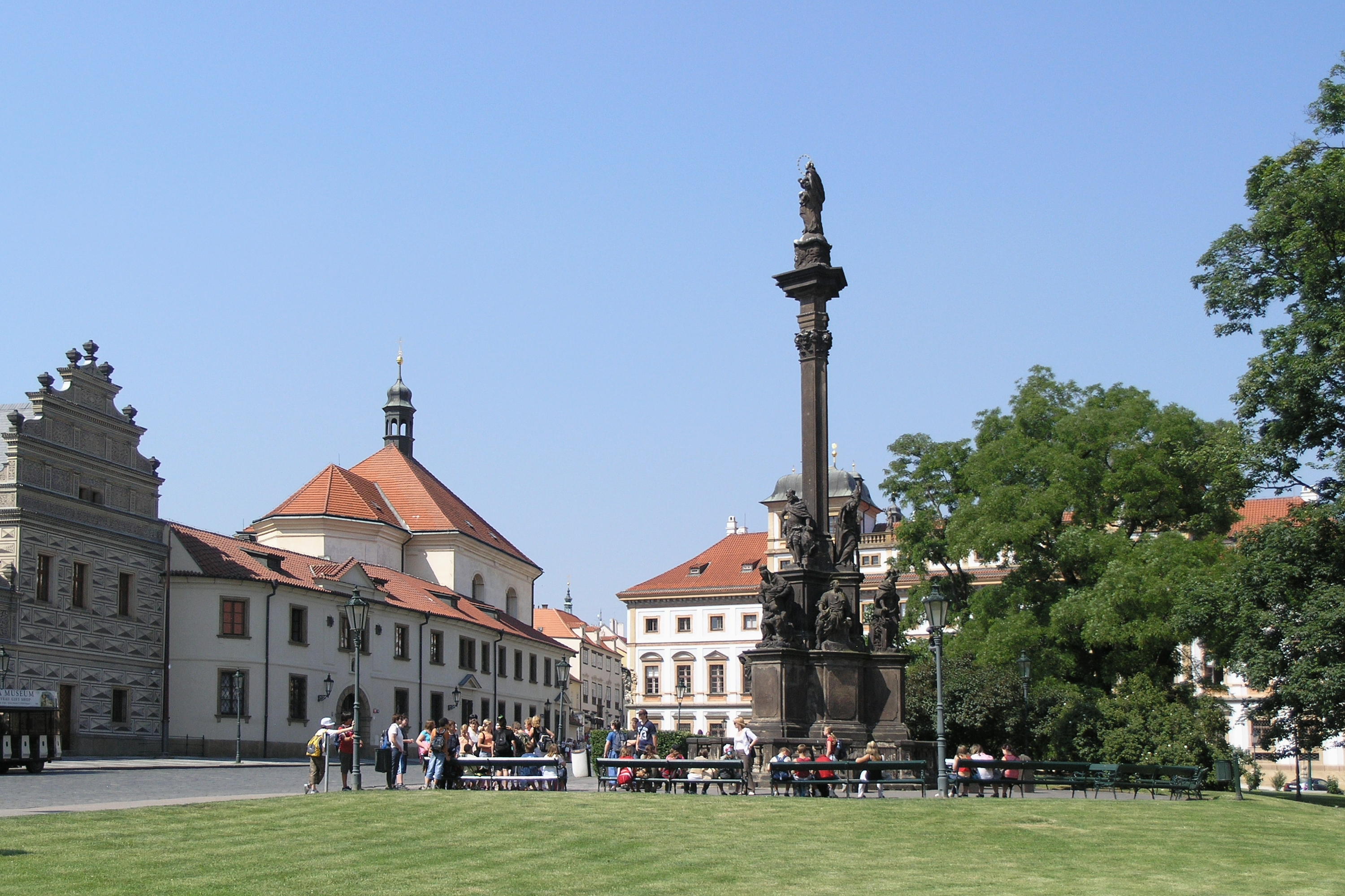 Mariánský morový sloup, Praha 1, Hradčanské náměstí